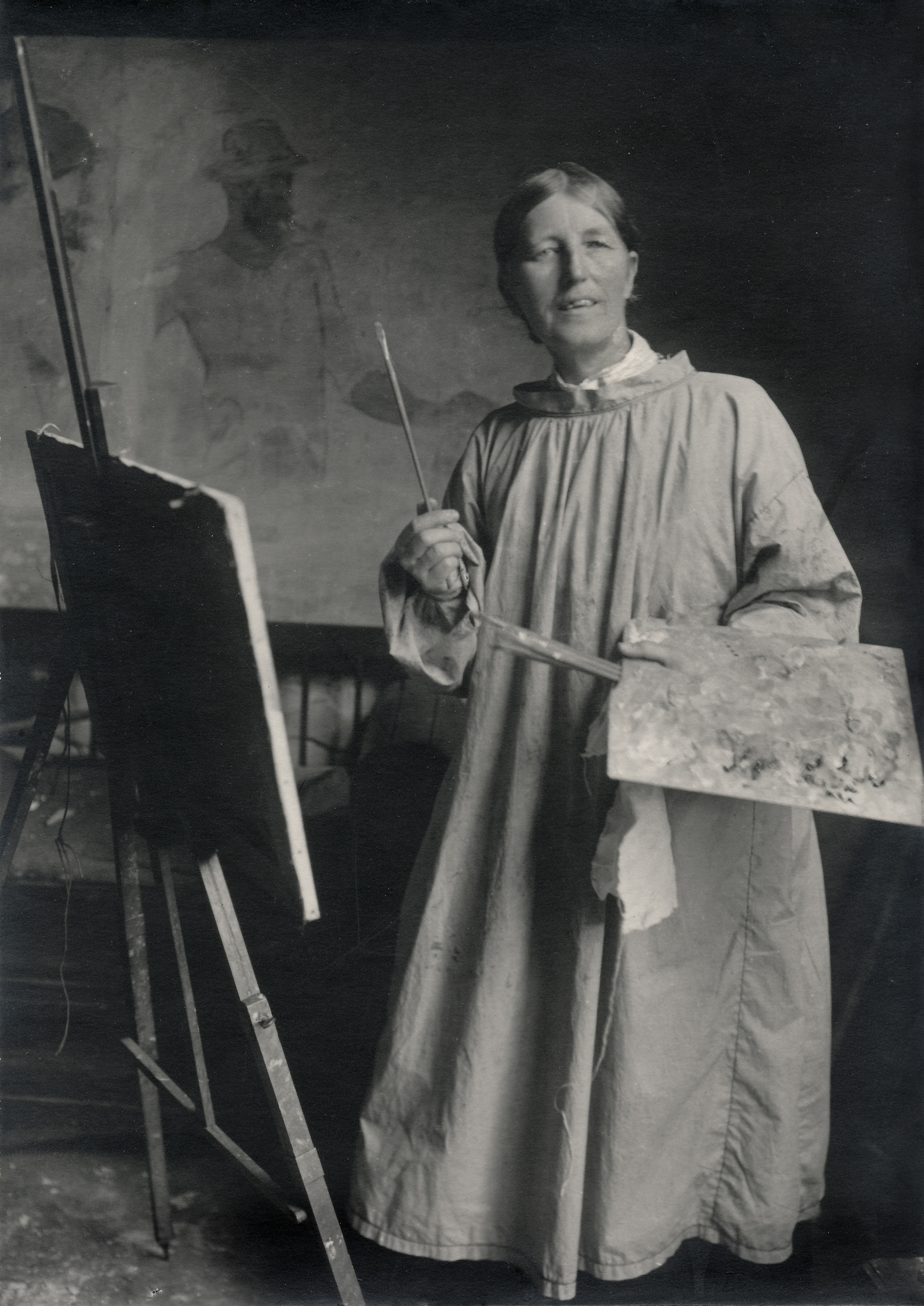 Anna Ancher med kittel, palet og pensler. 1911